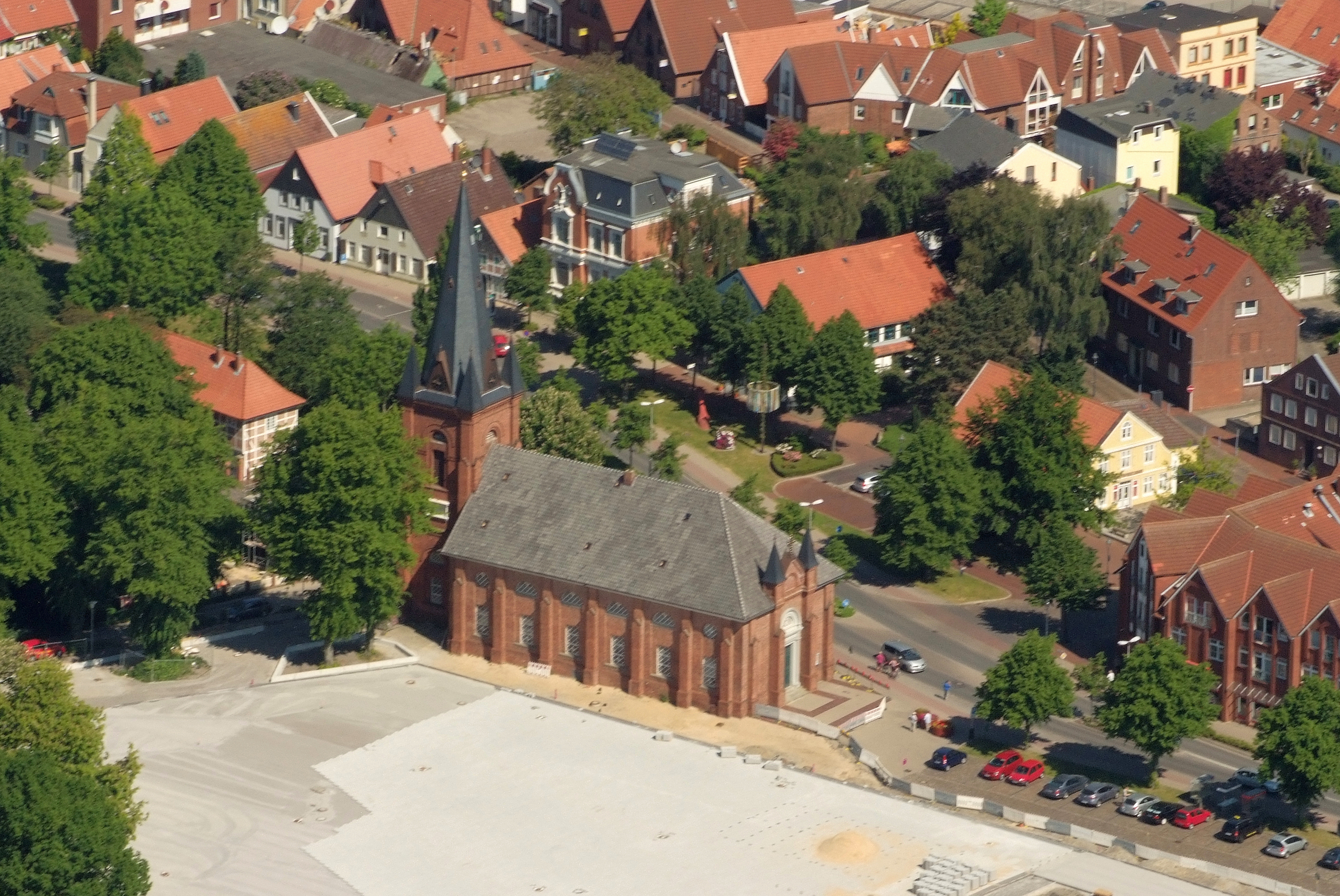 Martinskirche Cuxhaven Fotoflug vom Flugplatz Nordholz-Spieka über Cuxhaven und Wilhelmshaven